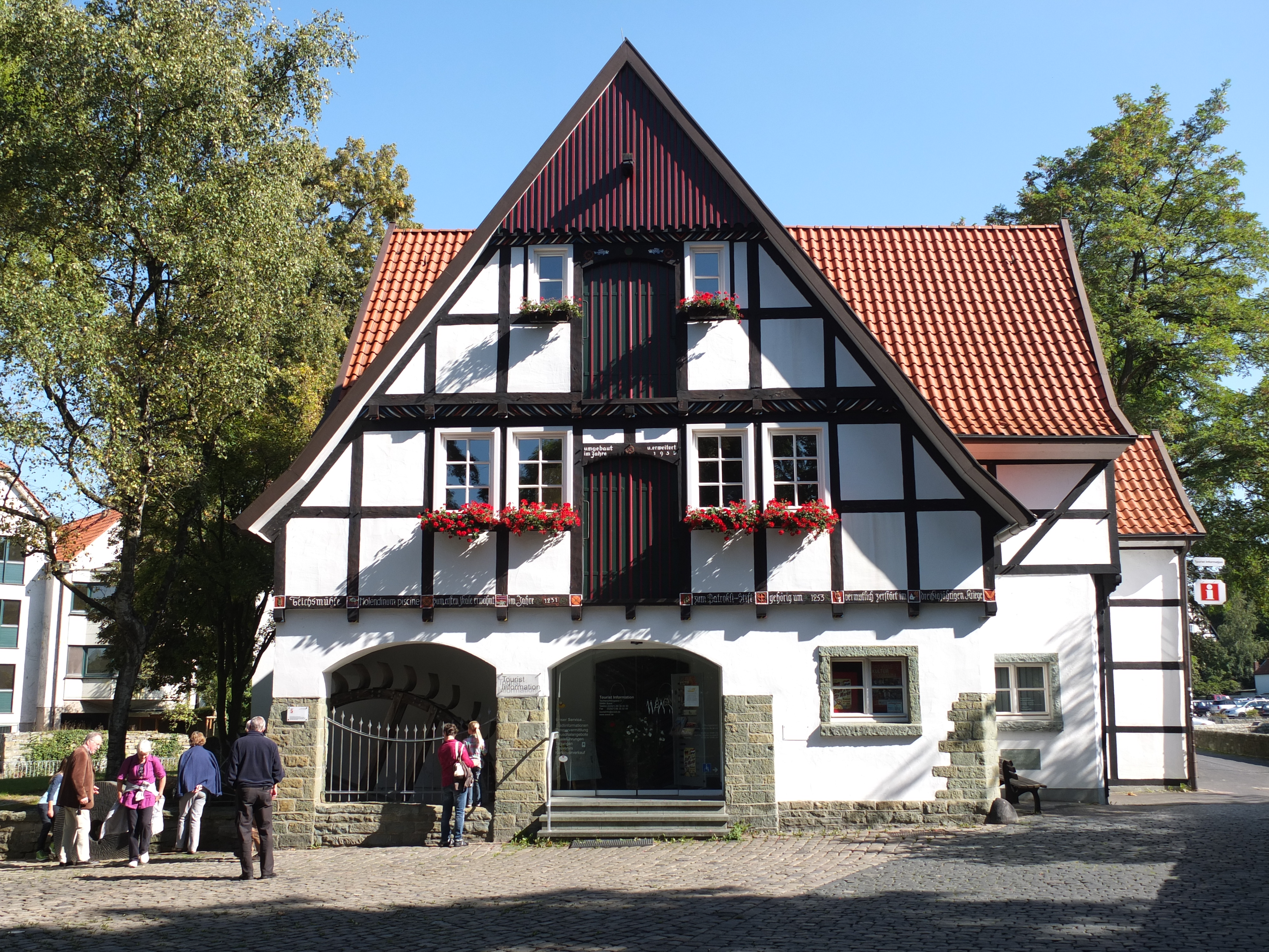 Teichsmühle in Soest am großen Teich This is a photograph of an architectural monument.